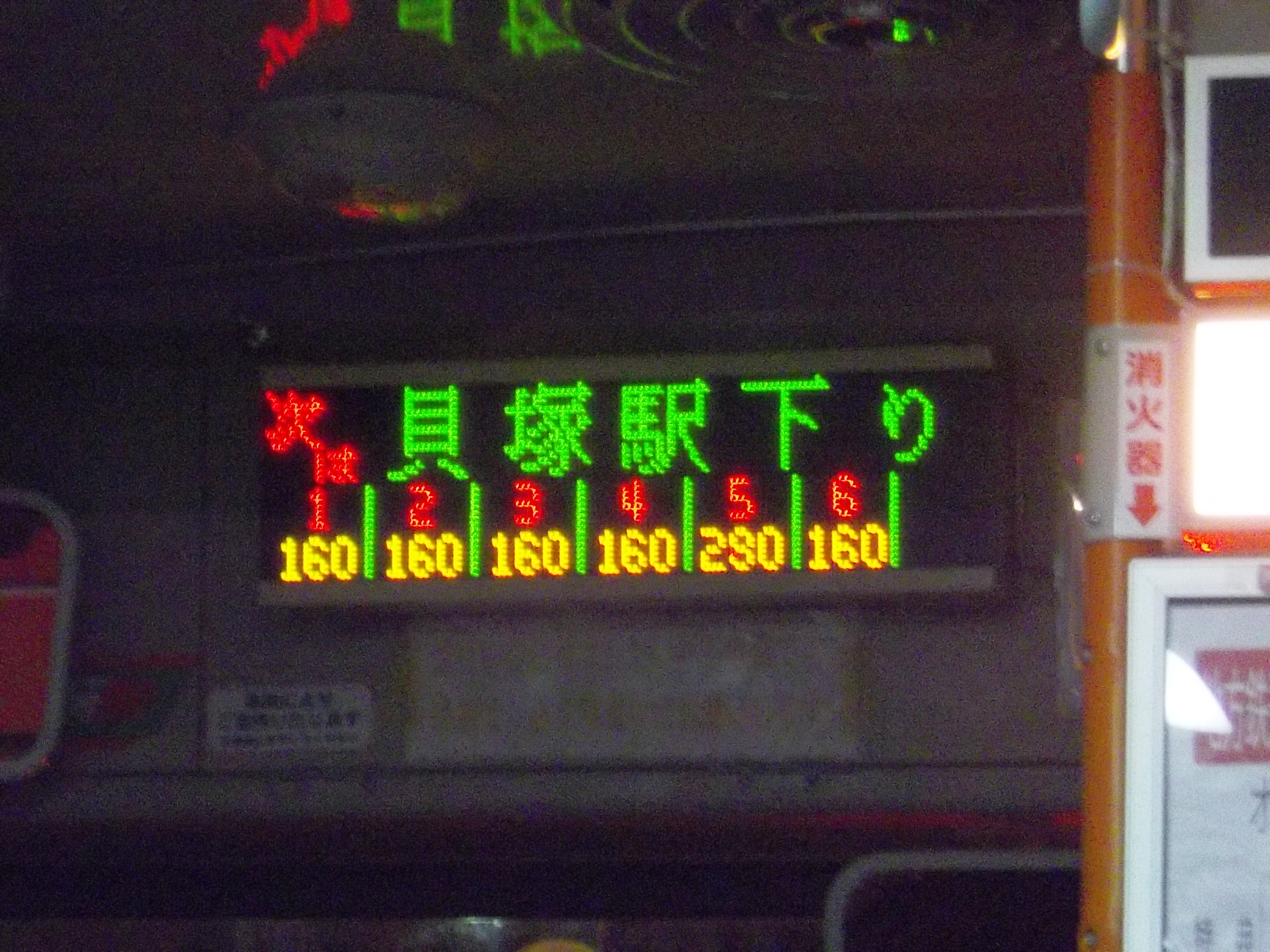 次停表示器に整理券方式の運賃表示マスを組み込んだもの。水間鉄道バス